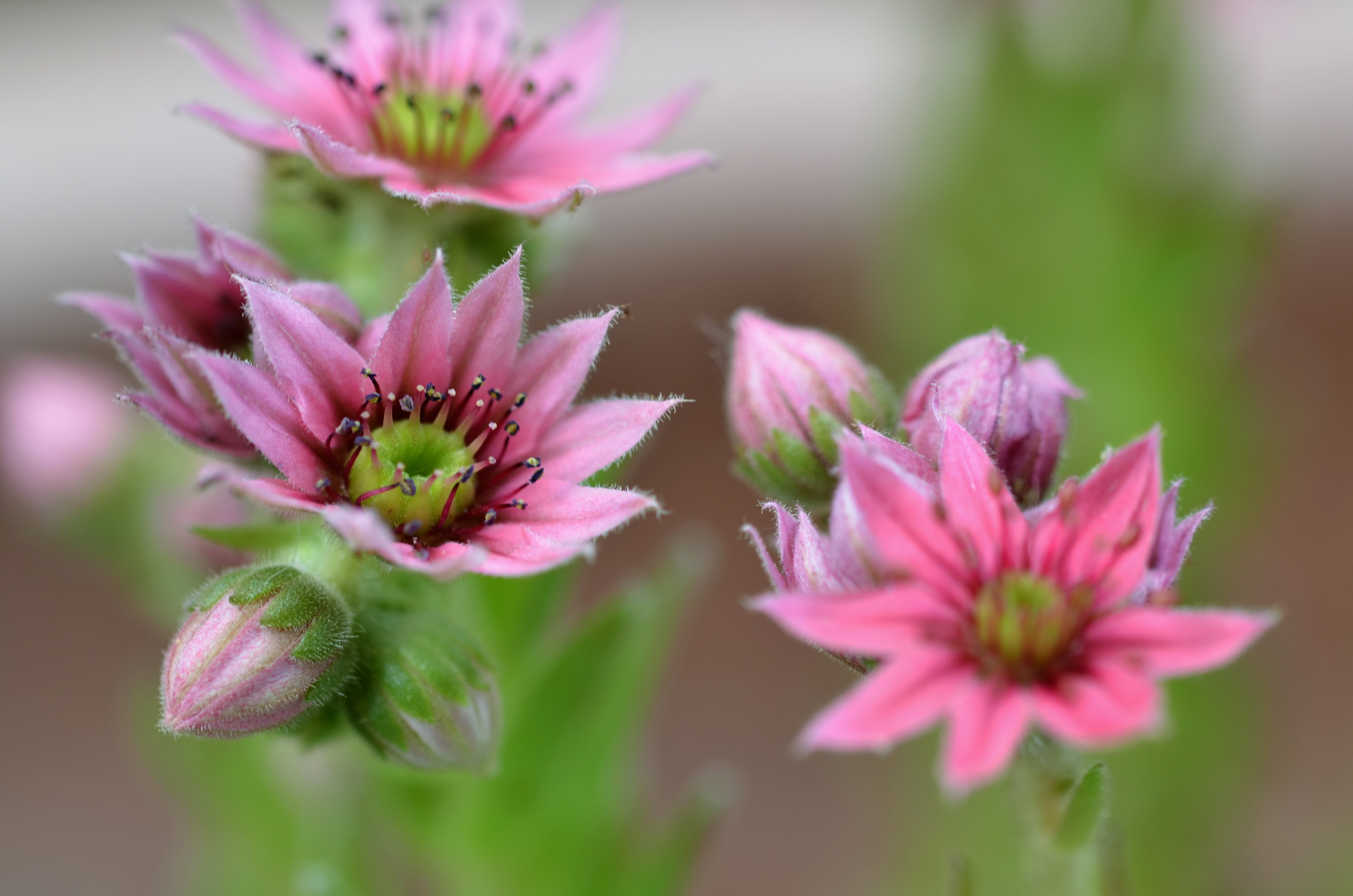 Sempervivum